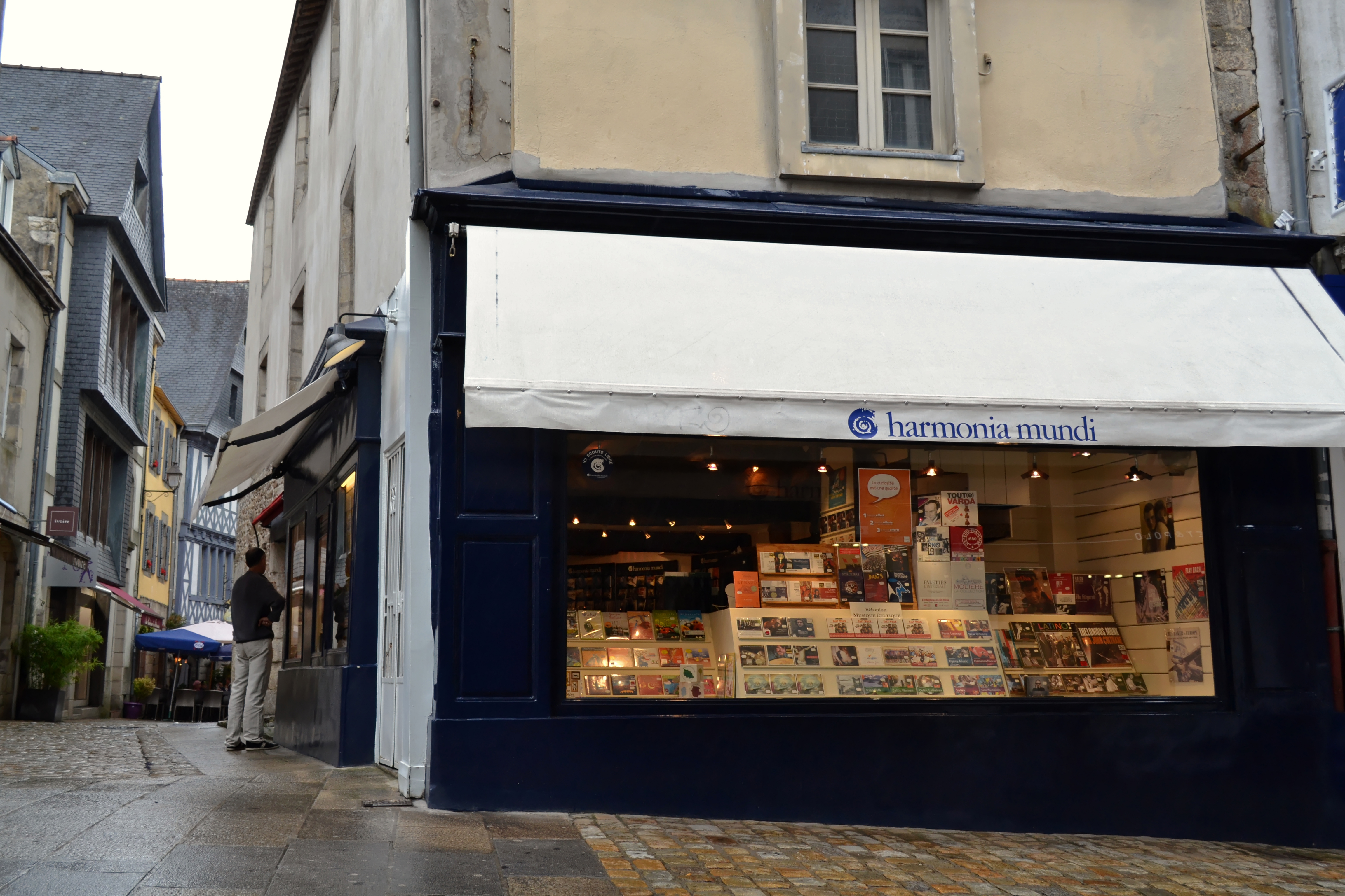 Magasin Harmonia Mundi, disquaire indépendant, 11 Rue du Guéodet à Quimper.